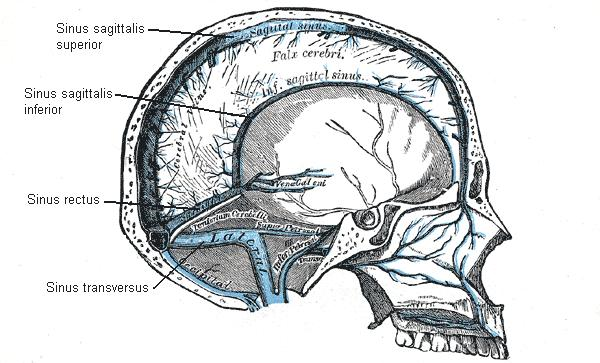 Venöse Blutleiter des Gehirns (Sinusvenen) Von